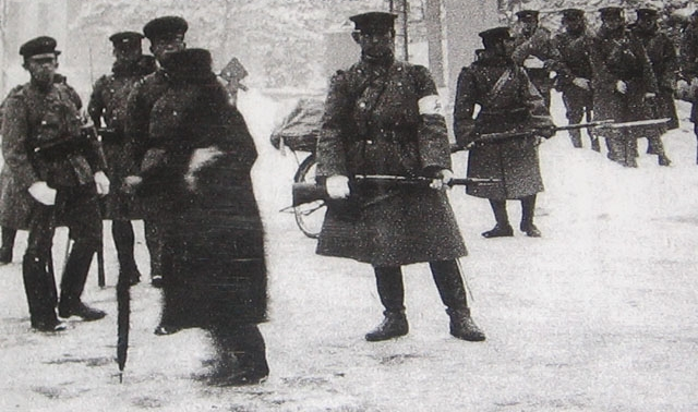 Ribelli durante l'incidente del 26 febbraio 1936